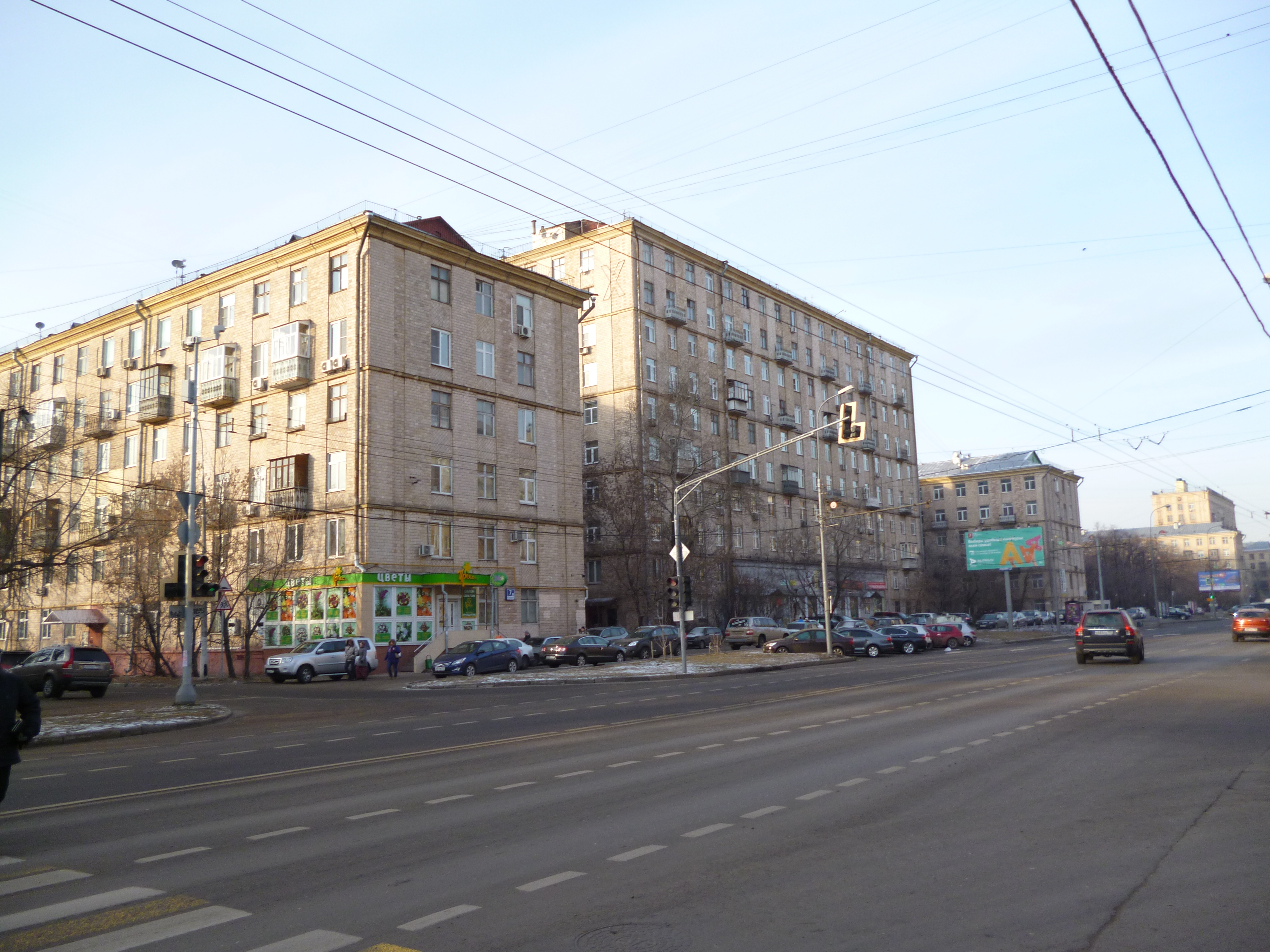 Улица Куусинена, дом 7